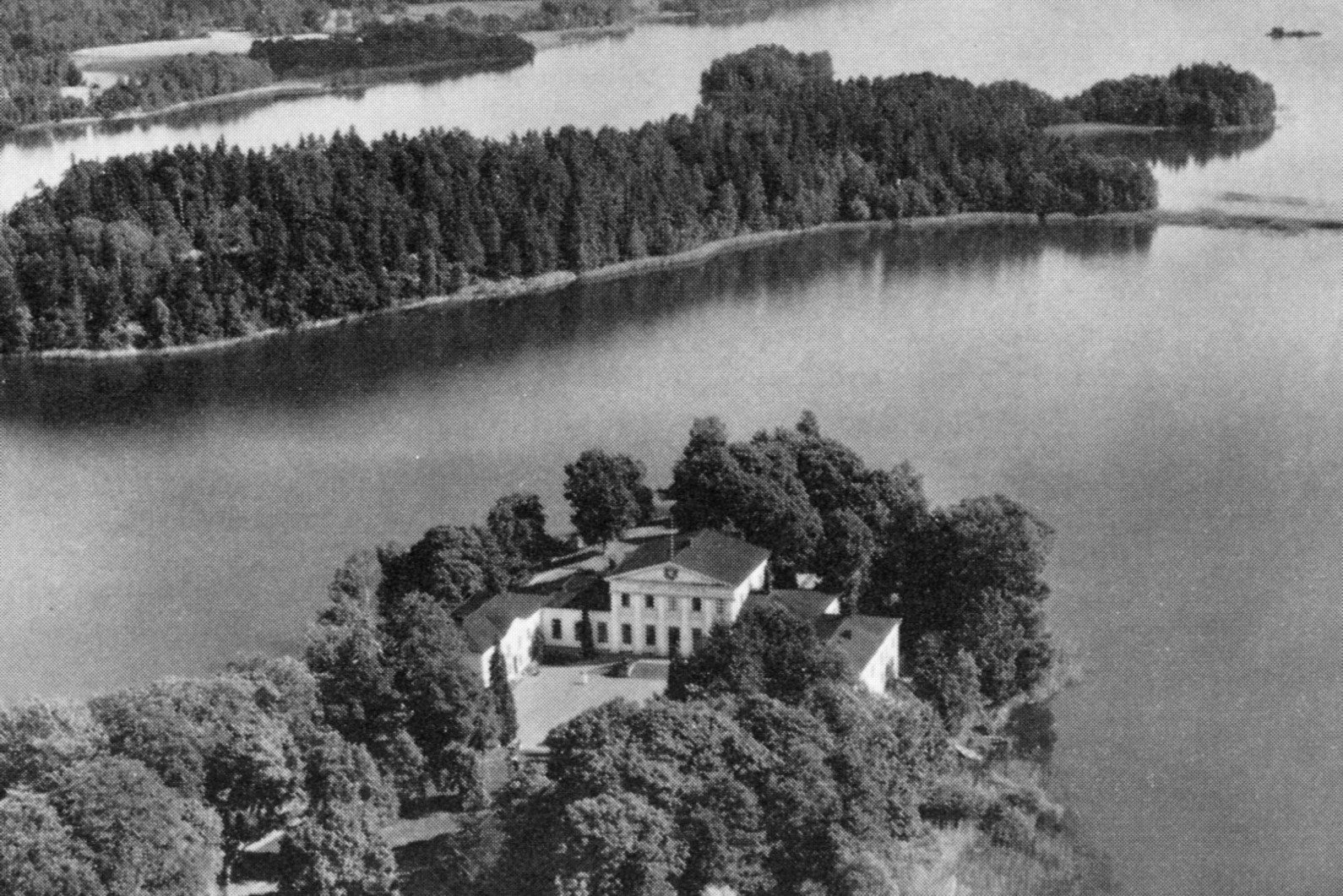 Elghammar slott i sjön Lockvattnet